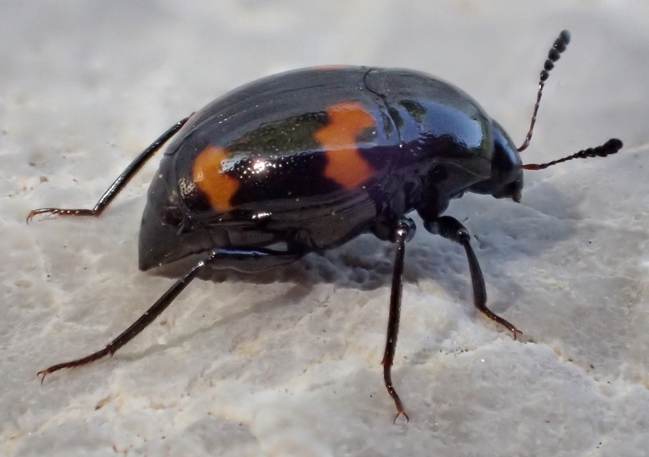 Scaphidium quadrimaculatum aus Griechenland, nordöstlich von Arta